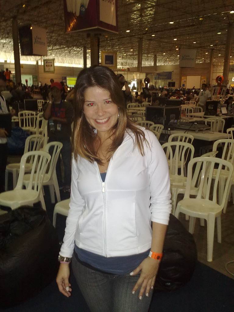 Atriz Samara Felippo no Campus Party